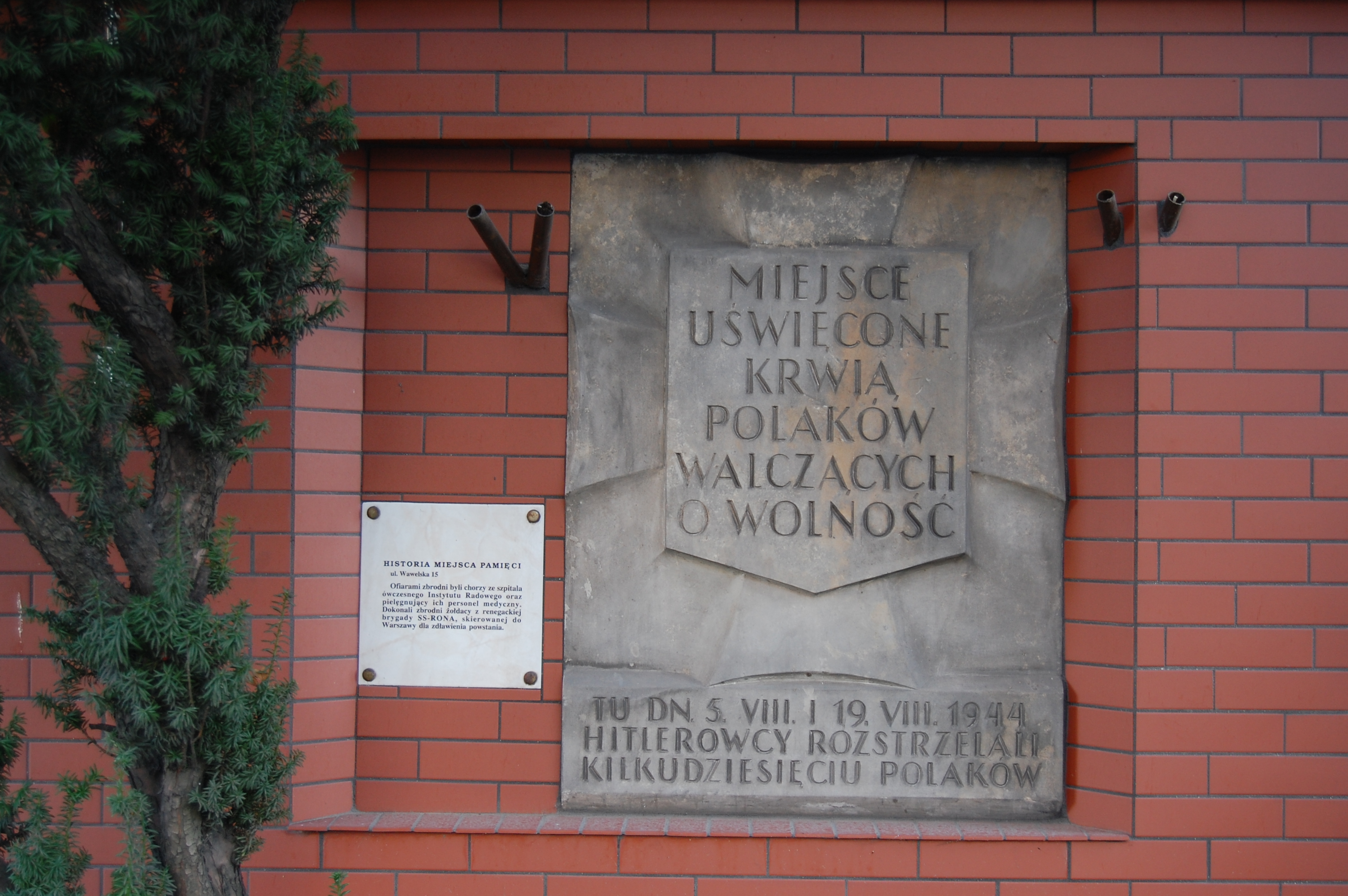 Tablica upamiętniająca pomordowanych przez hitlerowców w budynku Instytutu Radowego przy ulicy Wawelskiej w Warszawie.